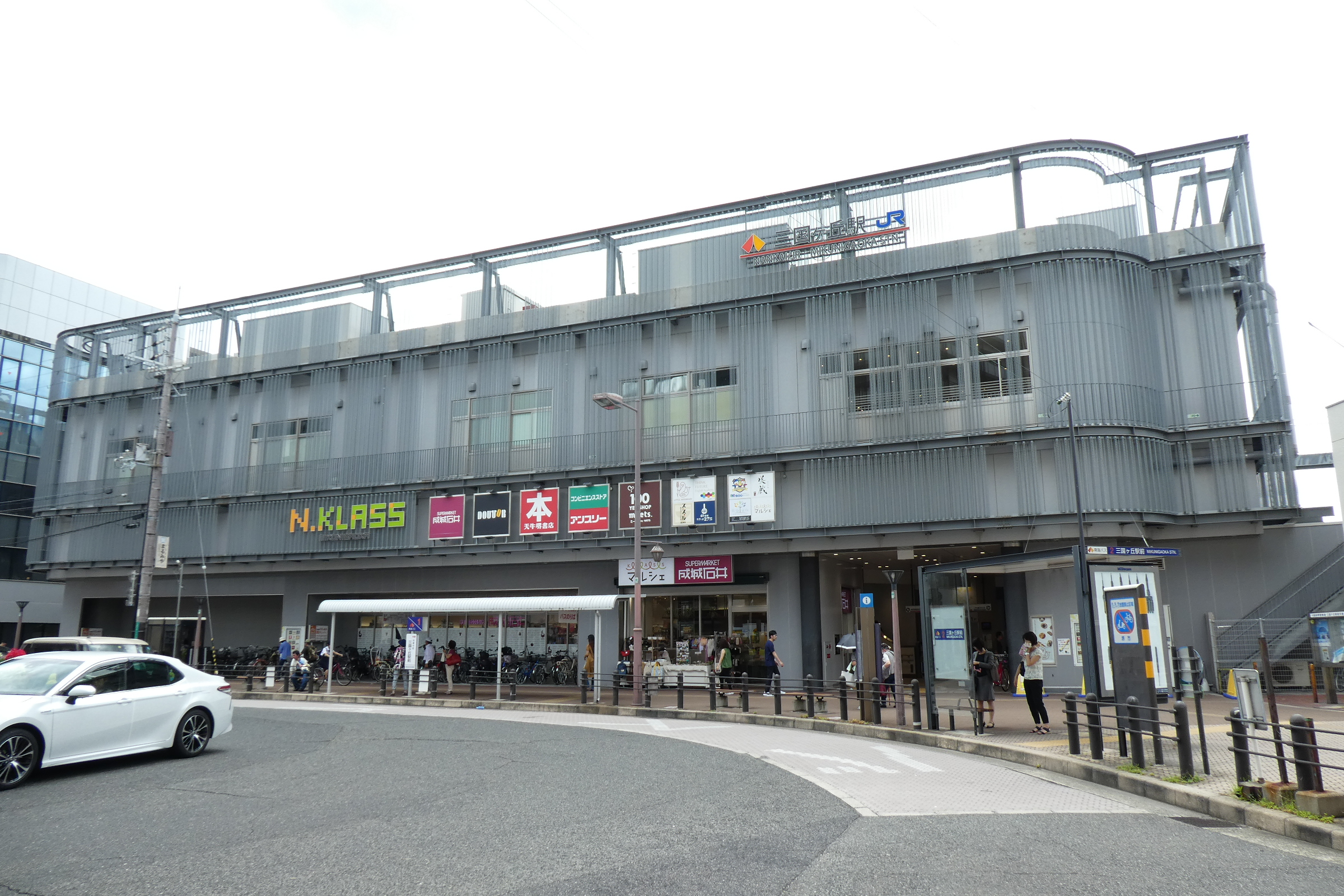 JR西日本、南海電鉄 三国ケ丘駅